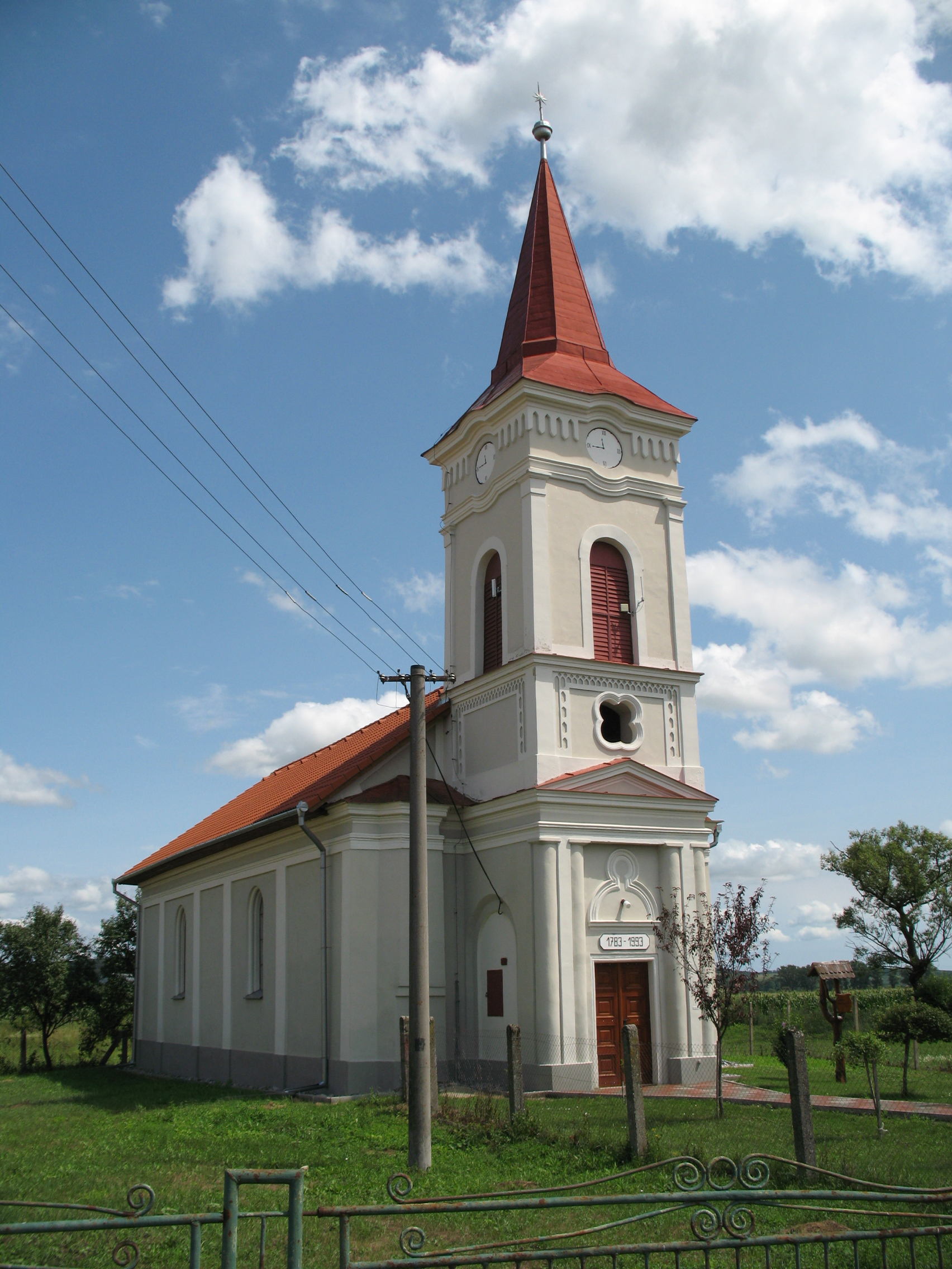 BátkaSlovenčina: Reformovaný kostol v Bátke